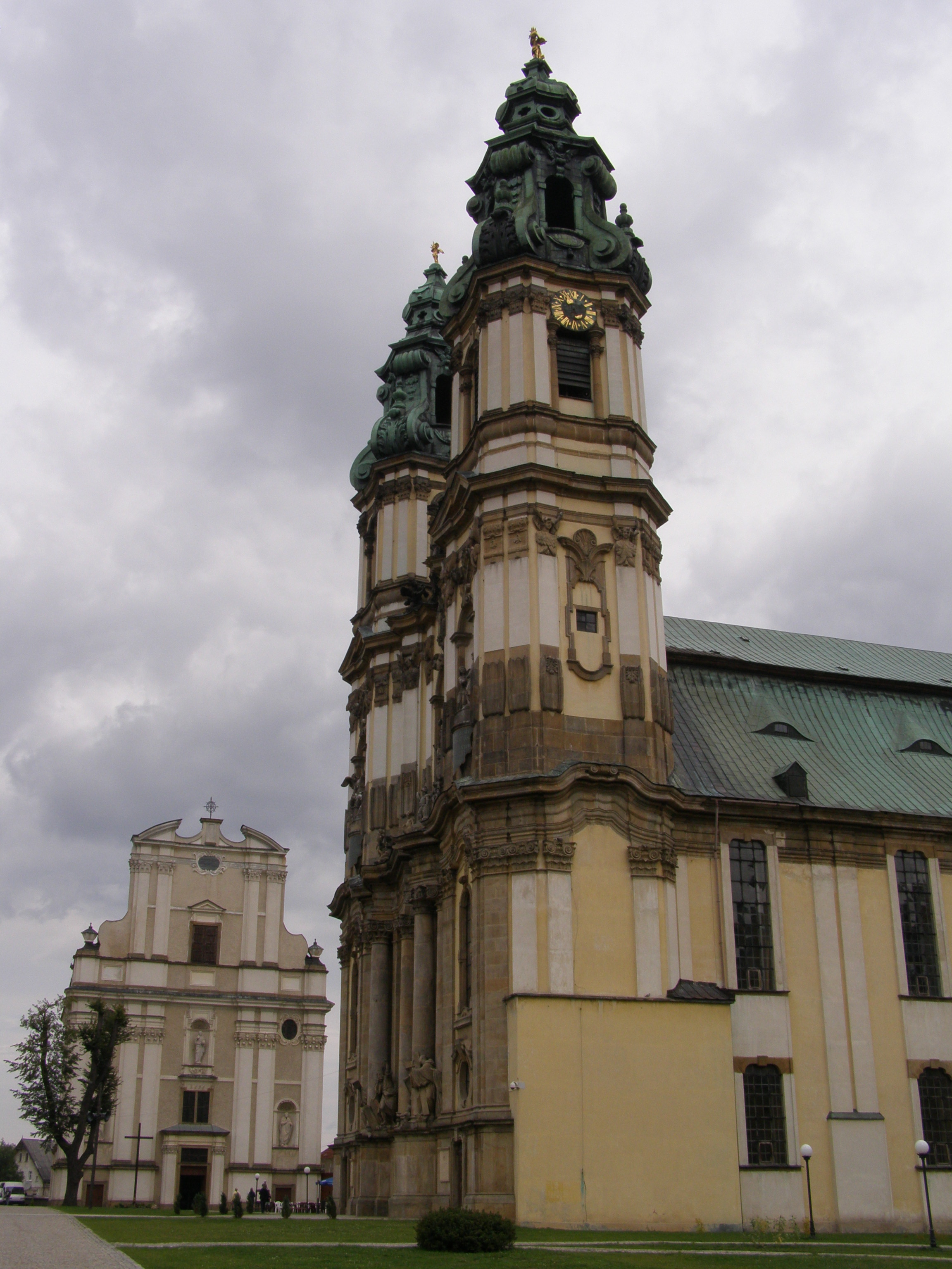 Krzeszów, bazilika, v pozadí kostel sv. Josefa